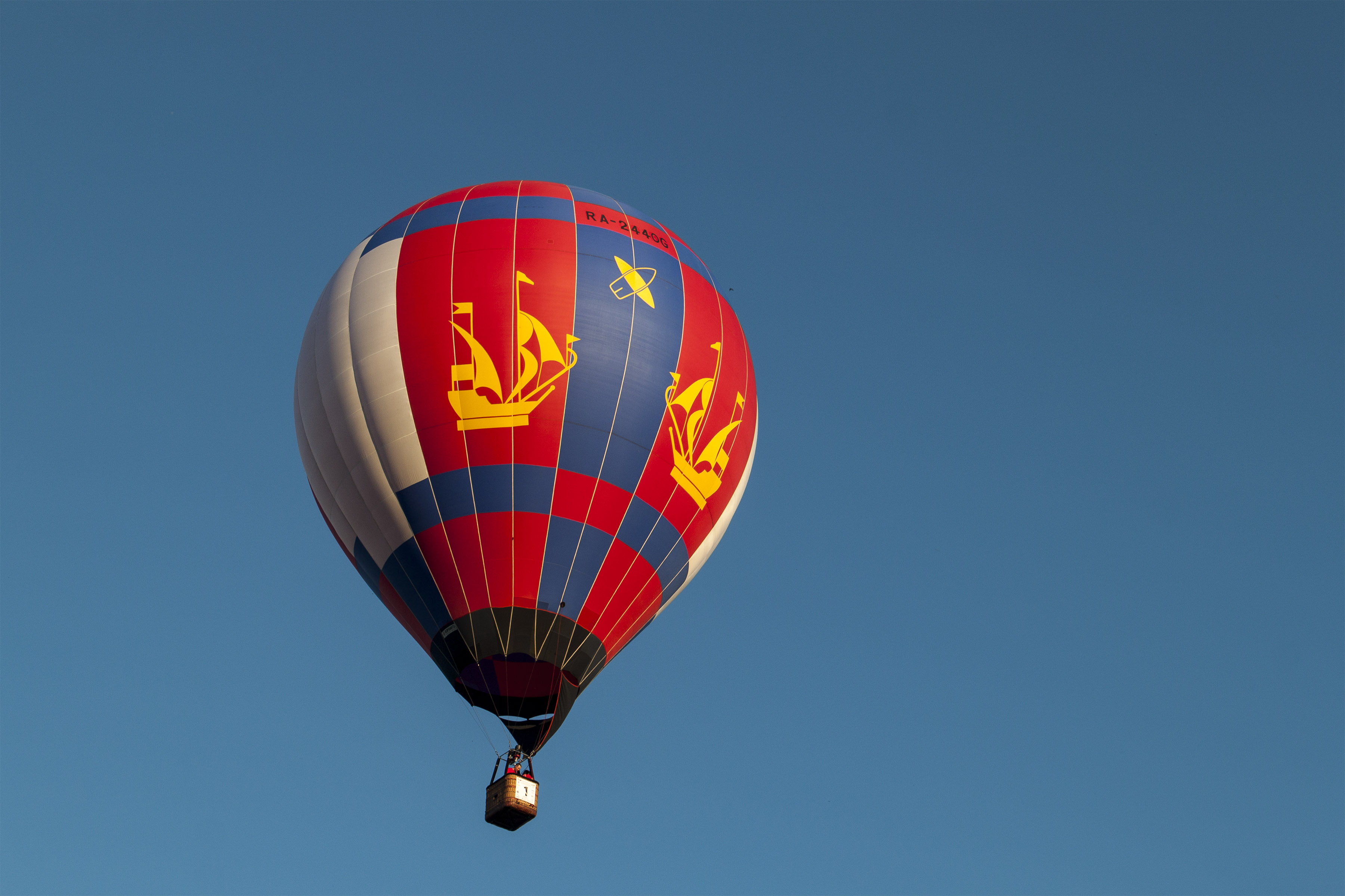 Воздушный шар в полете. Фестиваль "Небо России 2017", г Рязань